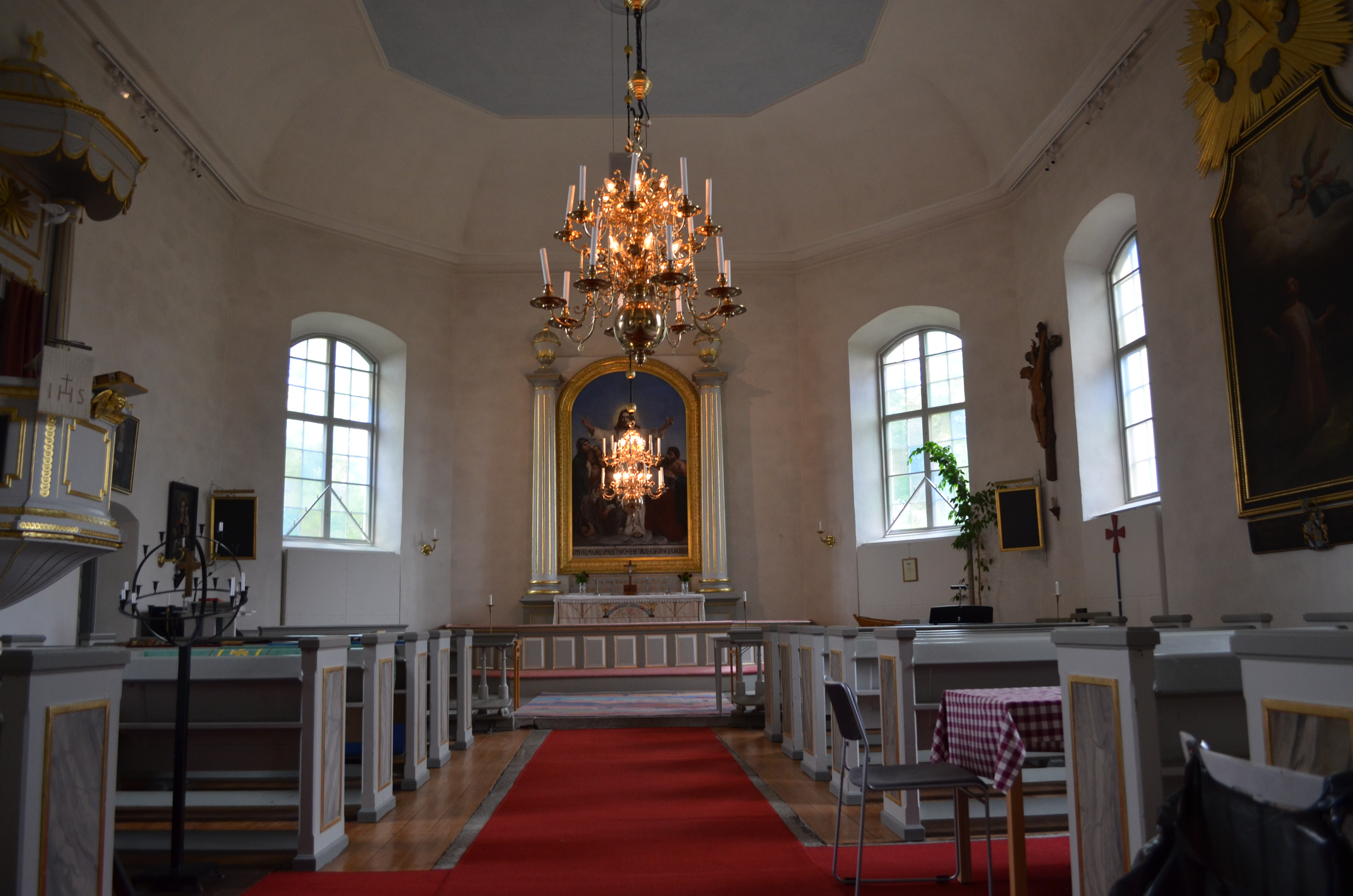 Kyrksalen